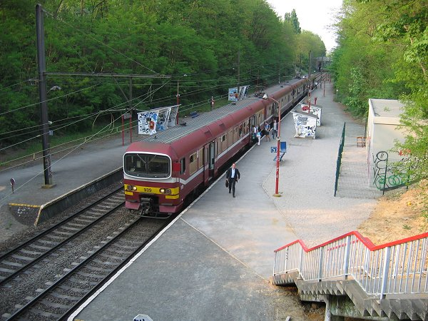 Foto van het Brusselse treinstation Boondaal.